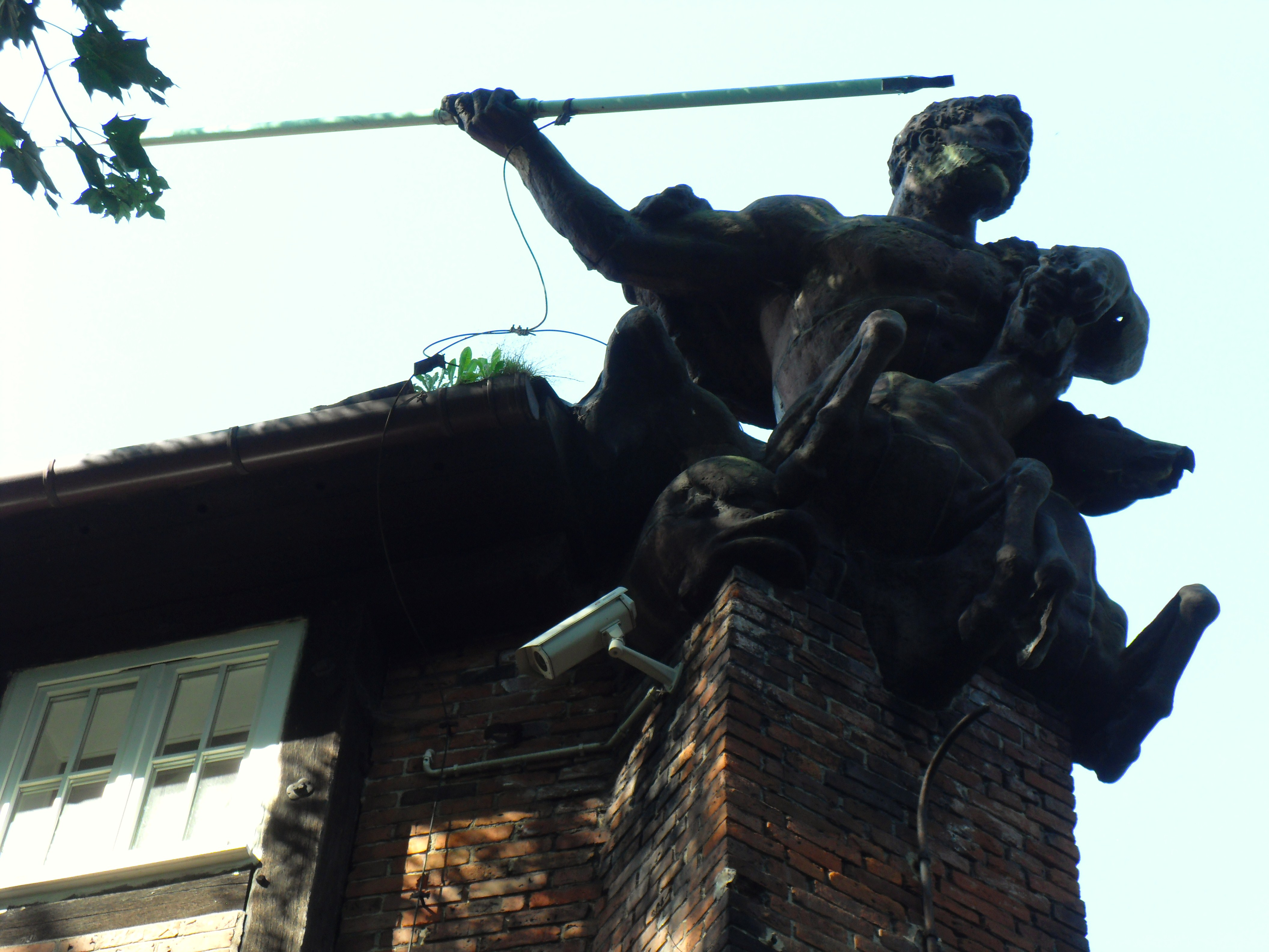 Gdańsk Biskupia Górka, ul. Biskupia 23, figura Neptuna.